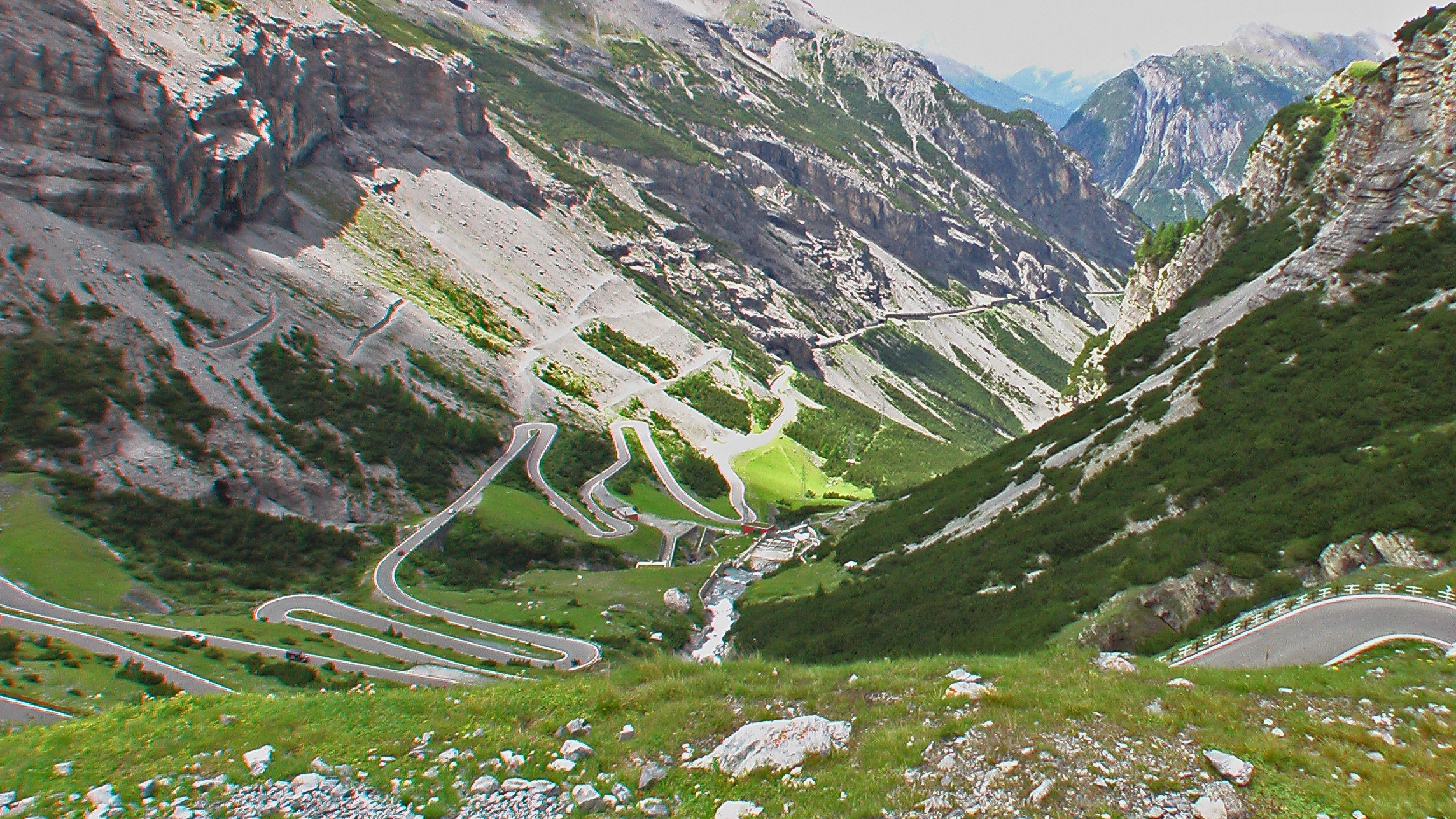 StilfserJochStrasse2008